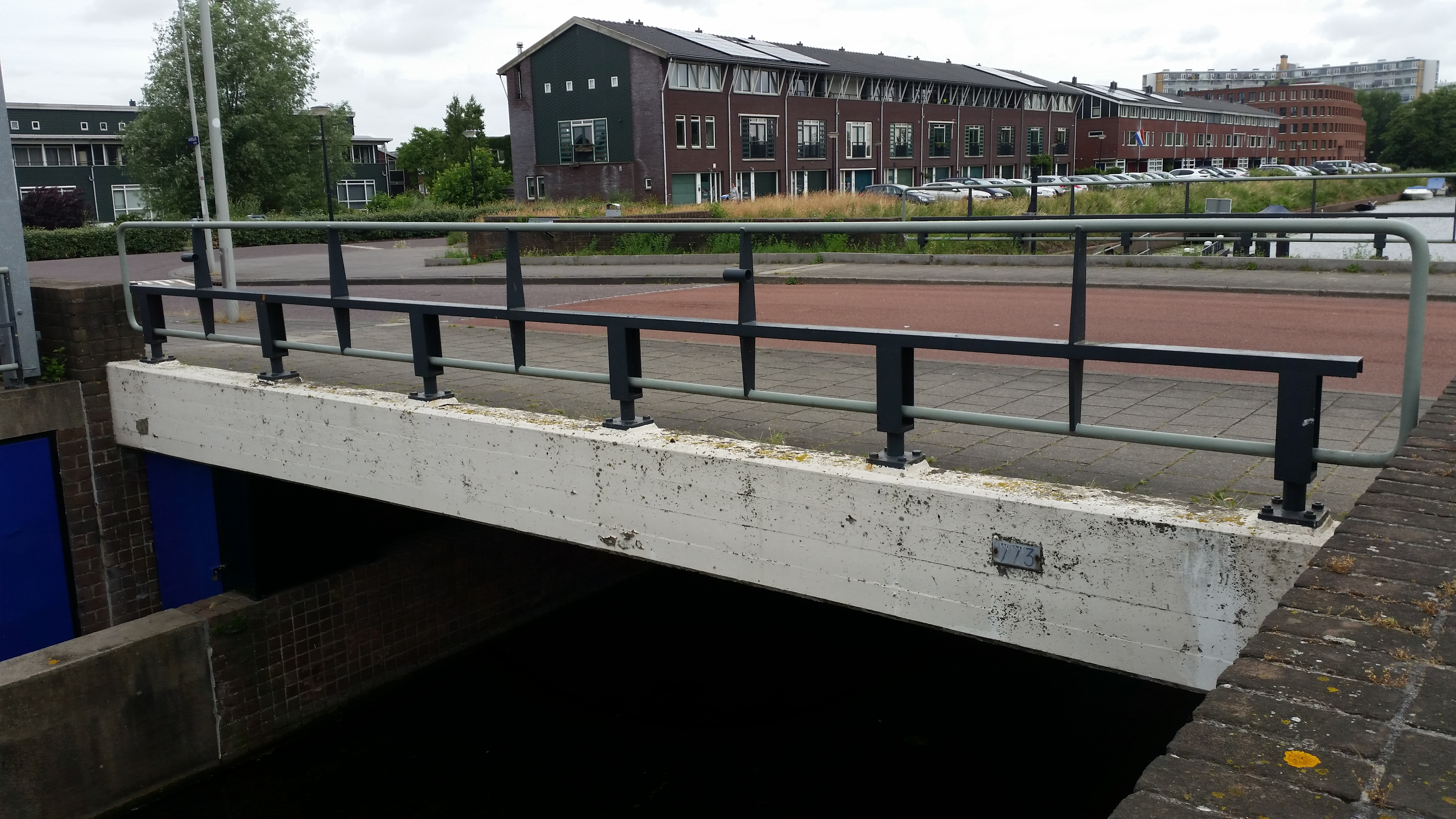 zijaanzicht Brug 773 (in Amsterdam) met leuning, overspanning, blauwe deuren en nummerplaat